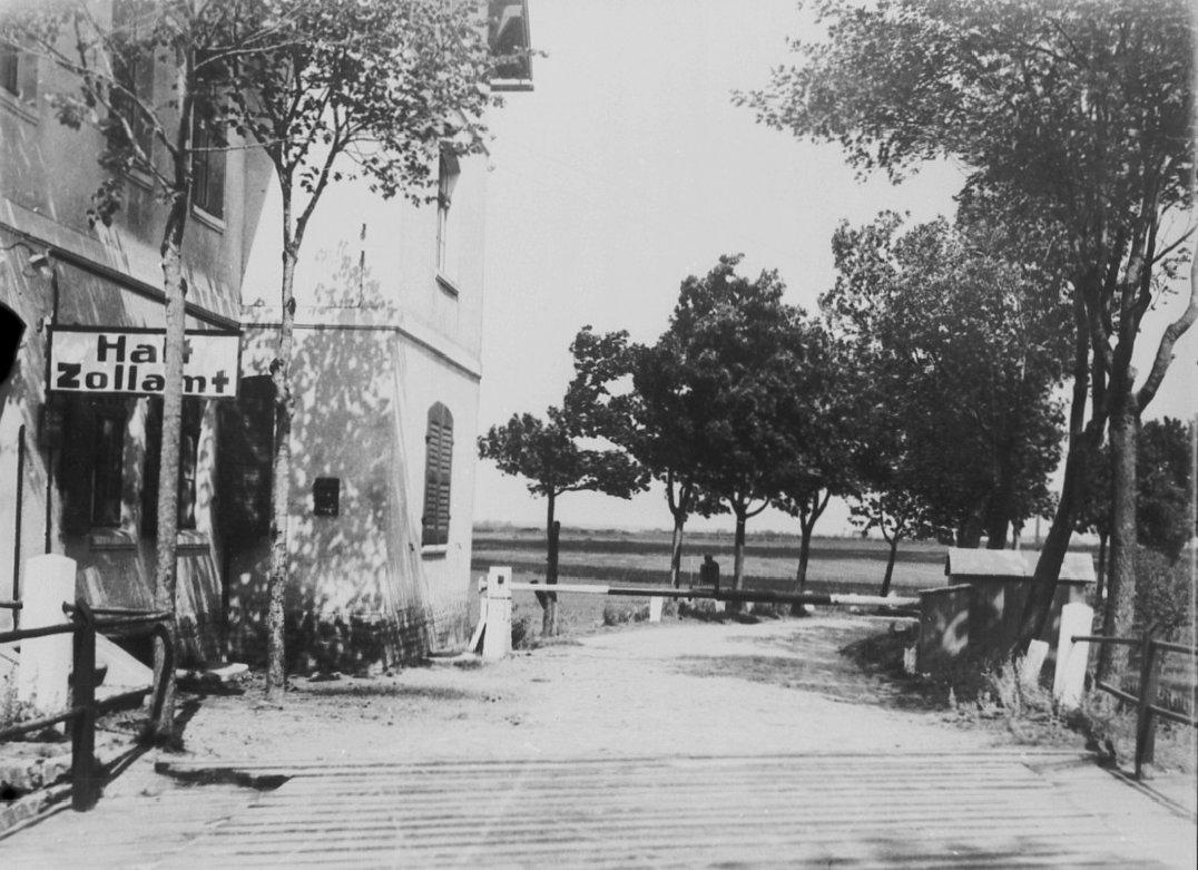 Dawna Granica polsko-niemiecka.